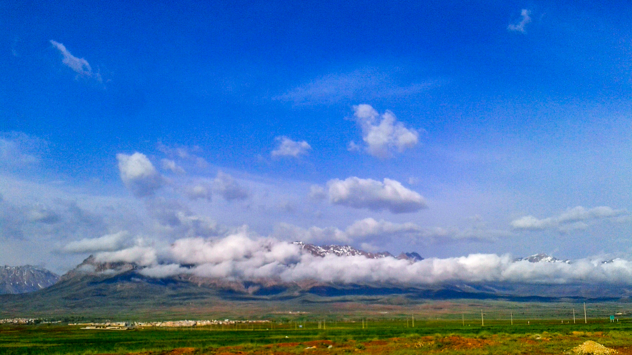 Fereydunshar county, Isfahan province, Iran